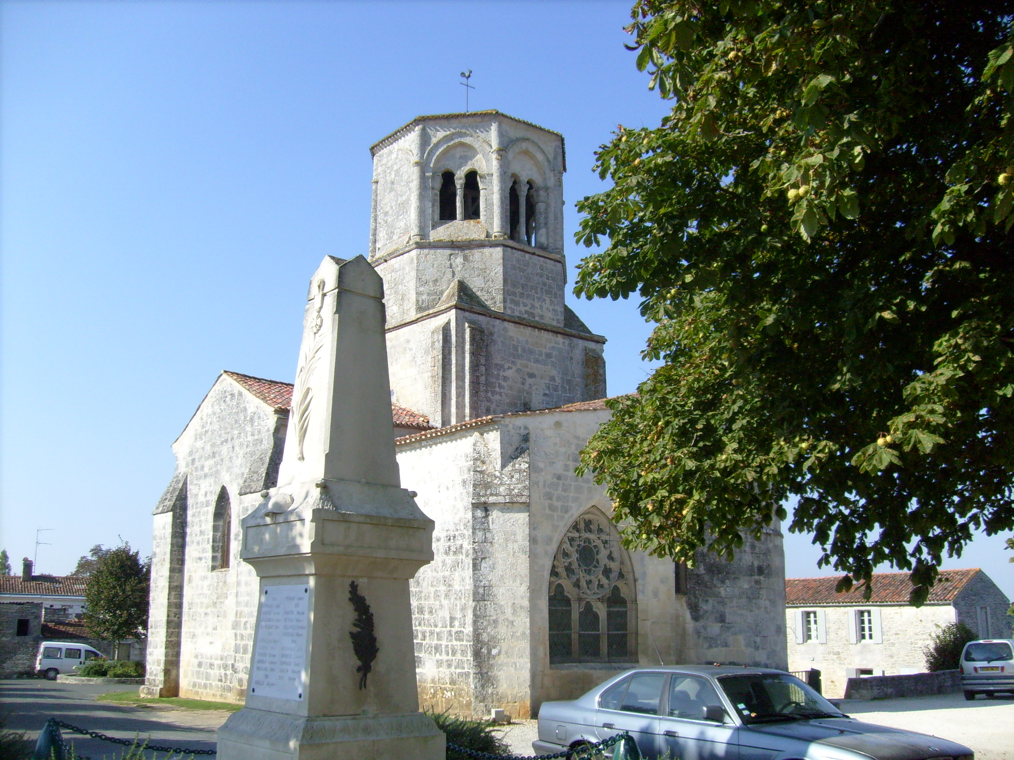 Eglise de Saint-Sulpice d'Arnoult